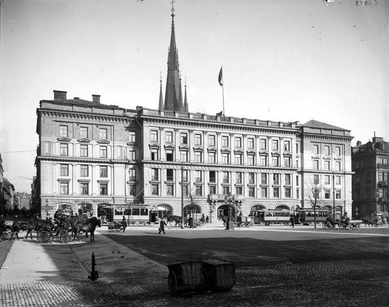 Hotell Continental, Vasagatan 22. I fonden Klara kyrka